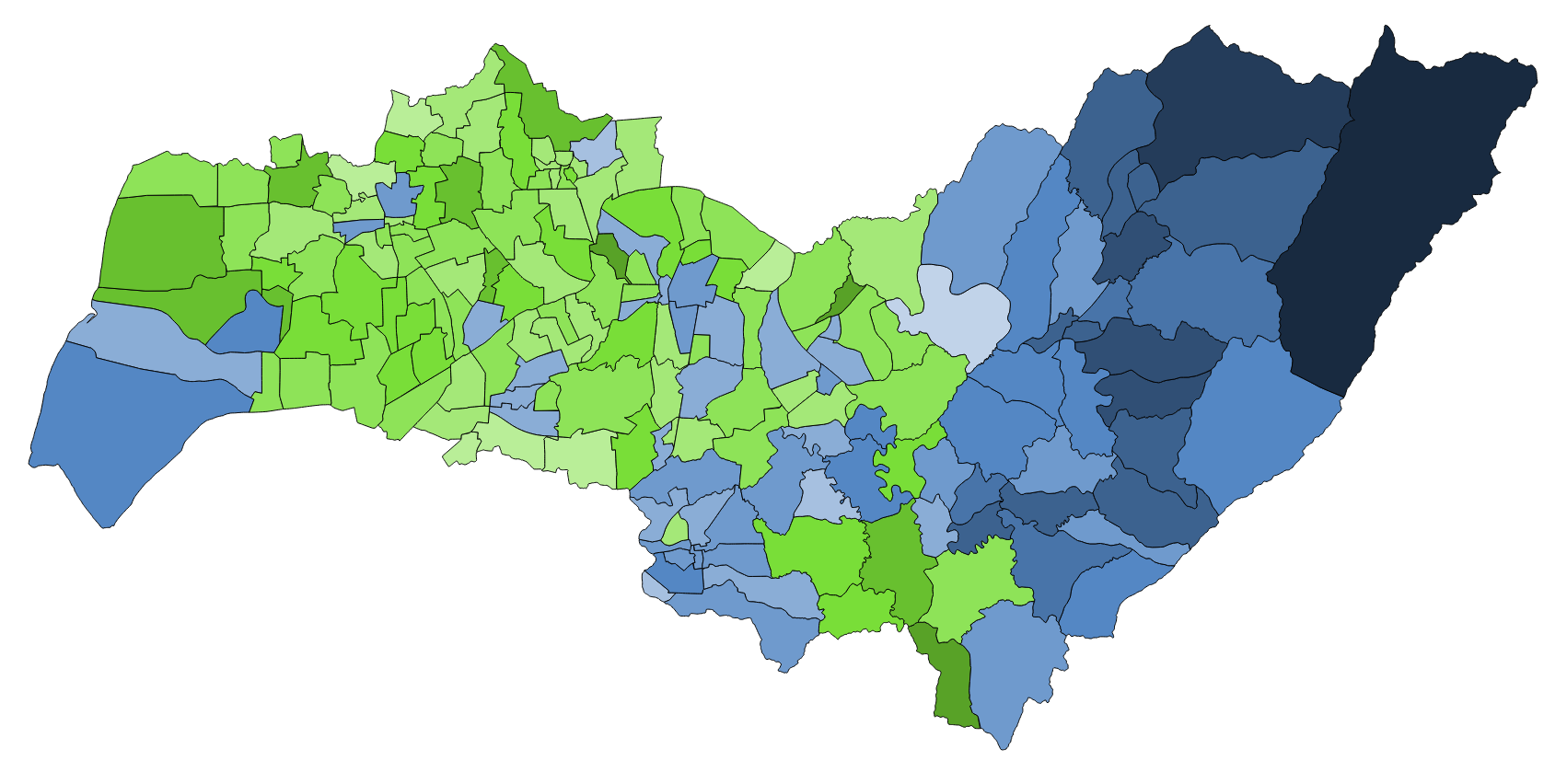 中文（台灣）: 顏色對照表